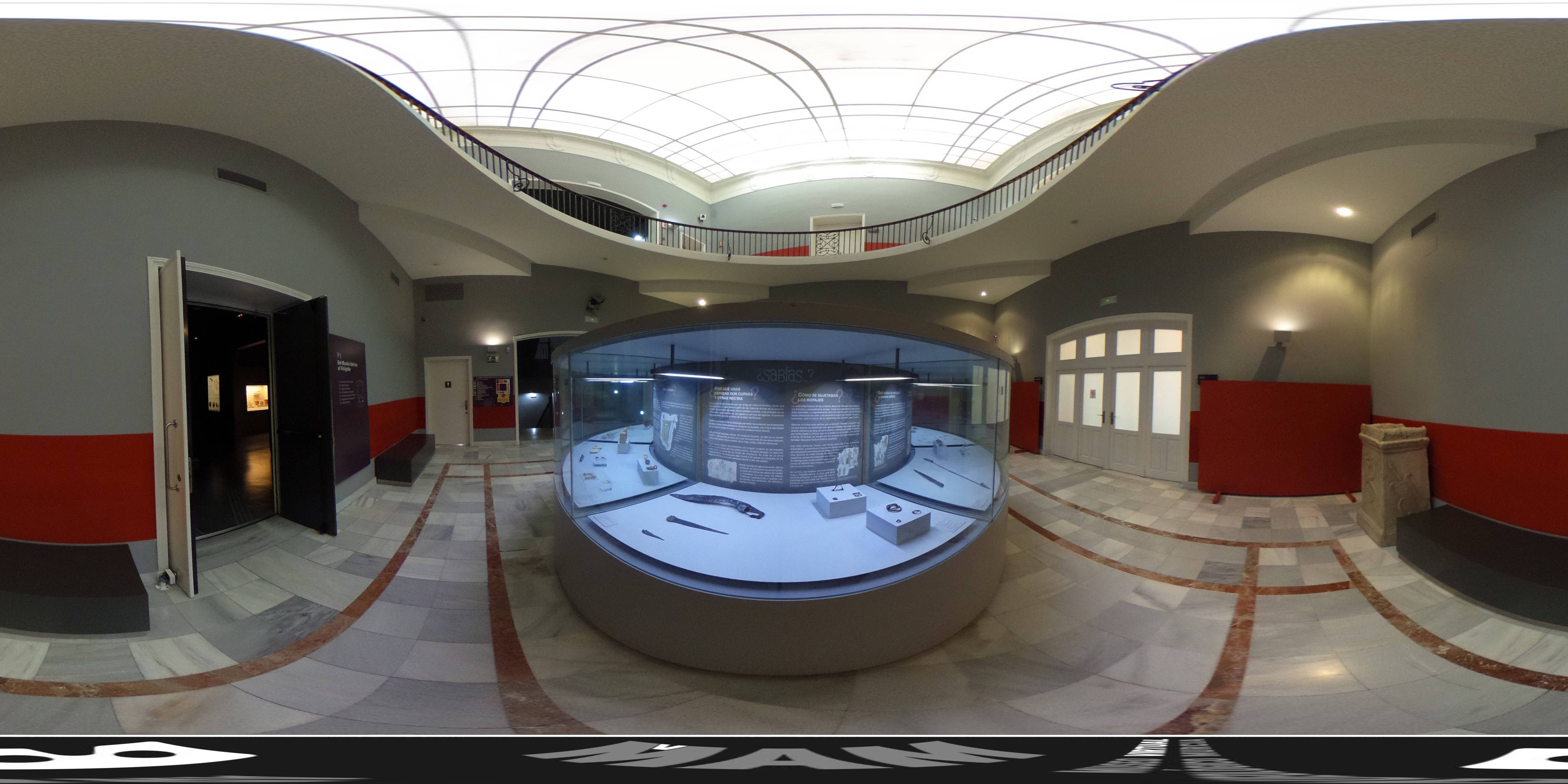 Vitrina anular. Sector 4: Fíbulas y espadas Proyecto MvAM